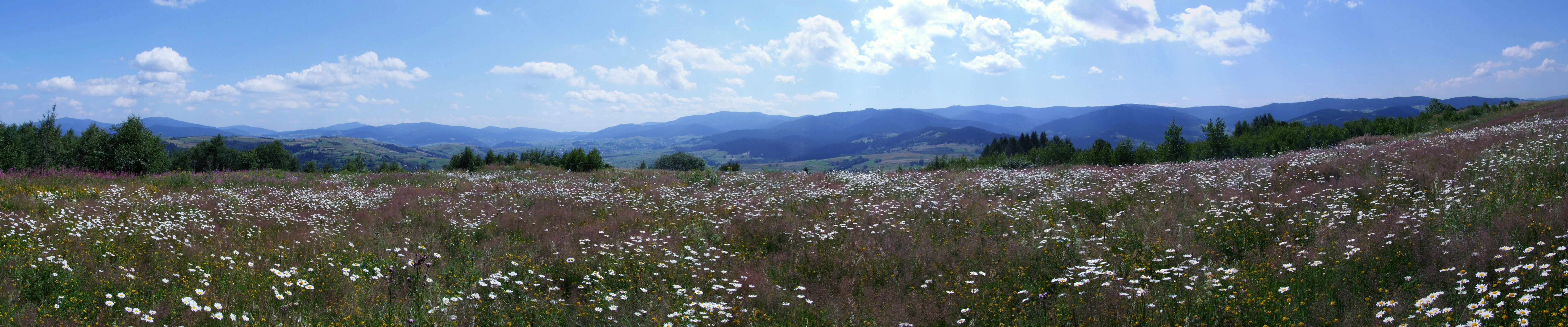 Panorama spod szczytu Potaczkowej